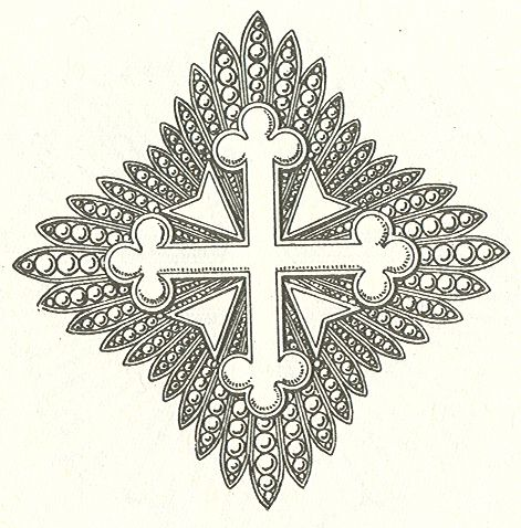 Scan van het boek van de in 1902 gestorven Maximilian Gritzner Uitgave 1884 Scan van Blz. 170 van het boek "Handbuch der Ritter- und Verdienstorden " uitgegeven 1893 door Weber.Tekening van de in 1902 overleden Maximilian Gritzner. Robert Prummel 10 jul 2008 16:40 (CEST)